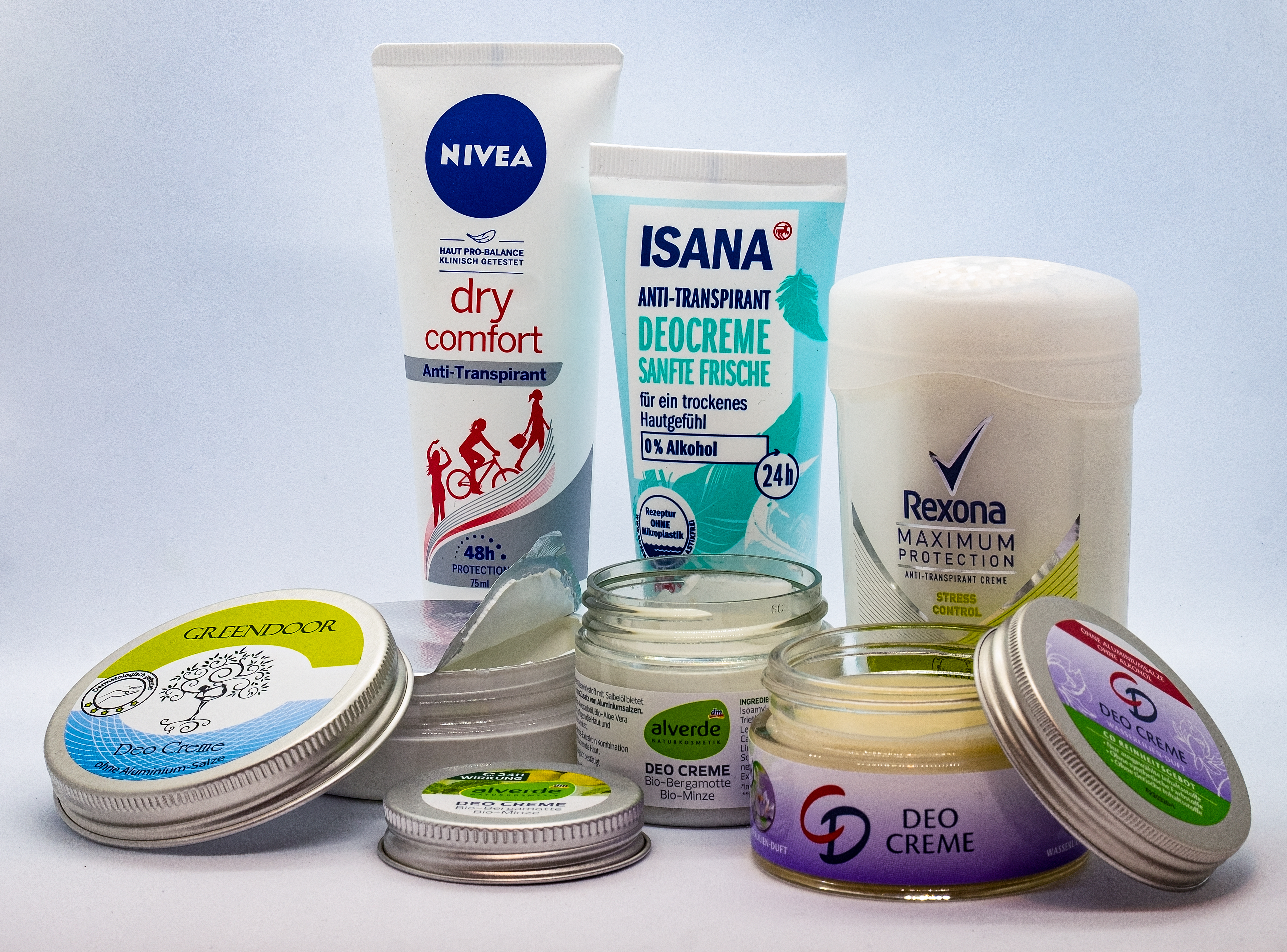 Deocreme